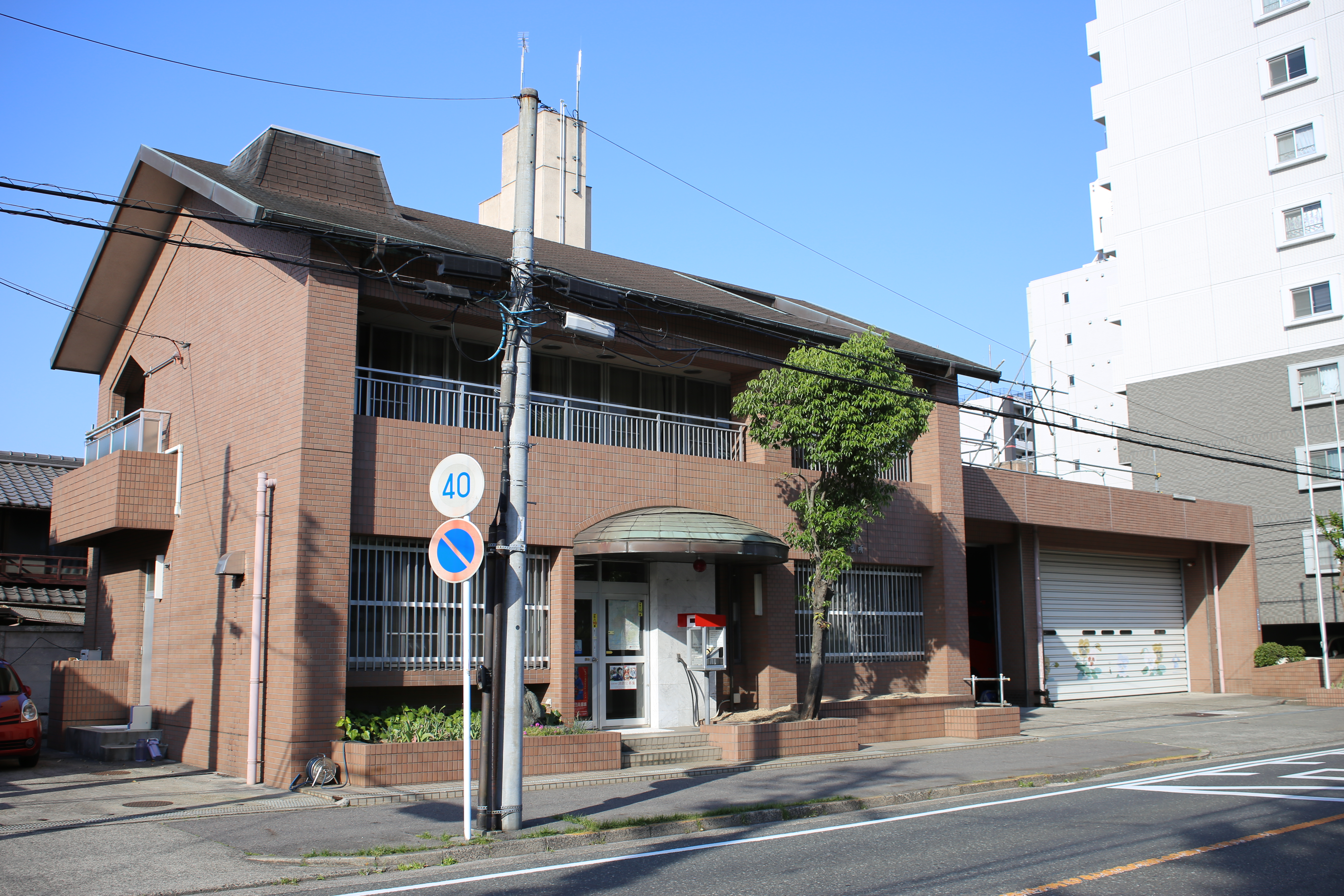 名古屋市中区橘一丁目の名古屋市消防局中消防署橘出張所を南側公道西側より撮影。